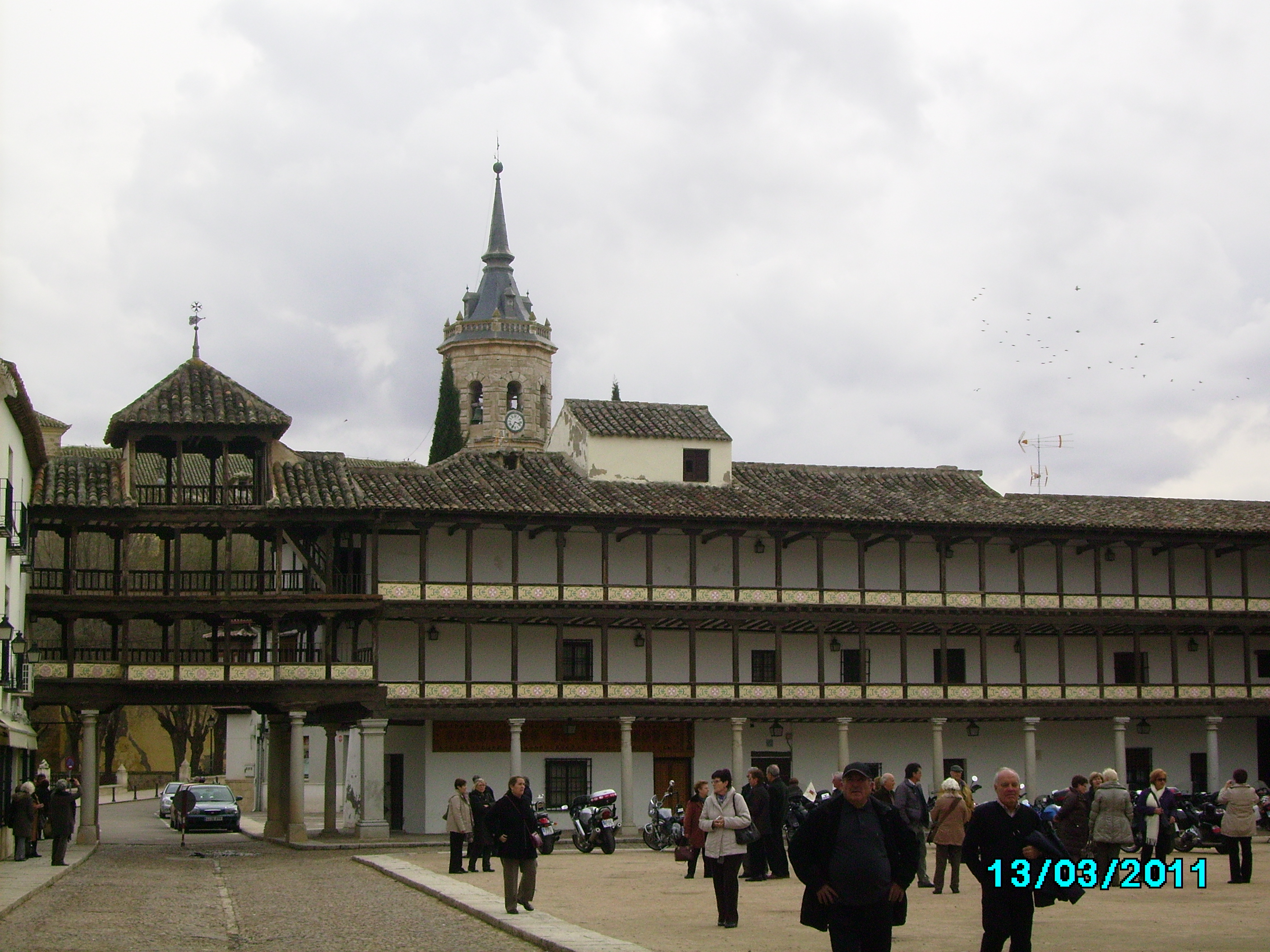 Plaça Major de Tembleque amb una de les balconades al fons